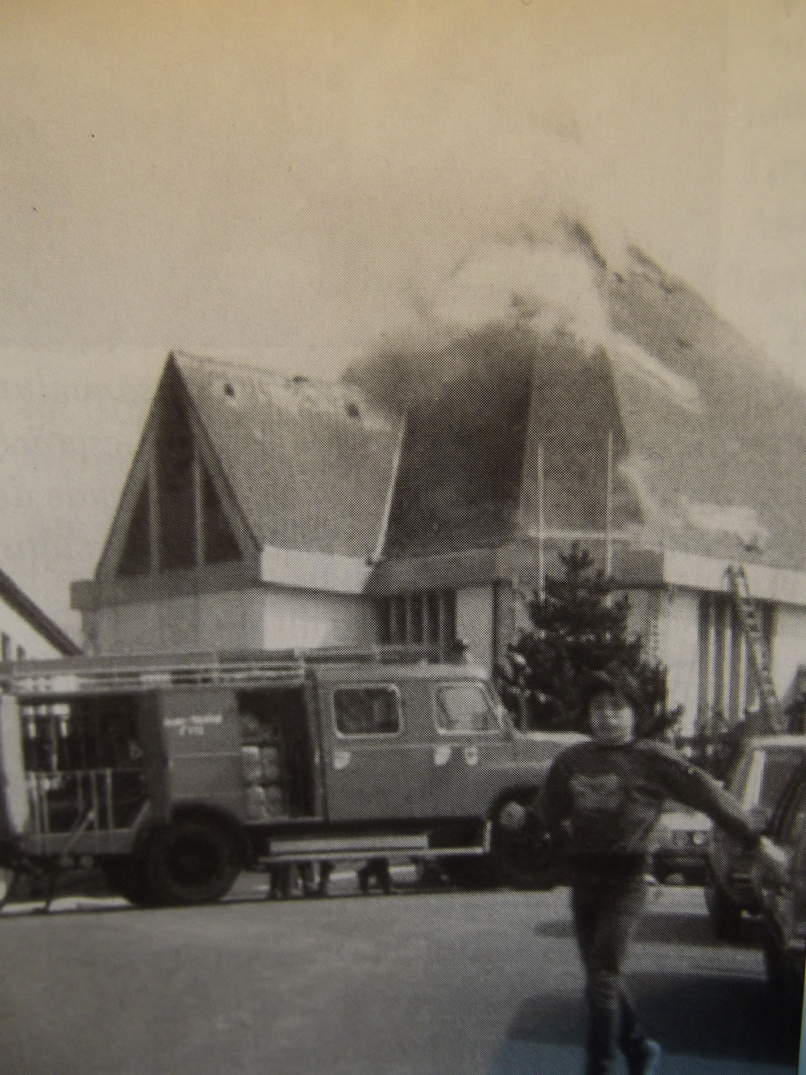 Am 18.04.1984 brannte der Dachstuhl der Kath. Kirche komplett ab . An diesem Tag entstand dieses Foto .